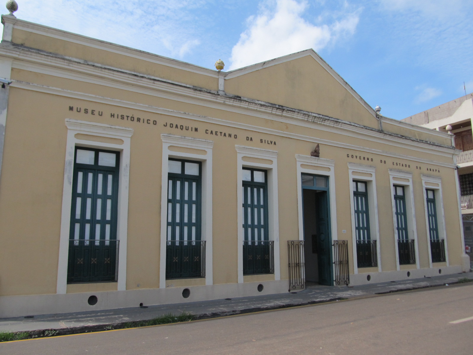 Macapa Historical Museum, Amapa State, Brazil (2)